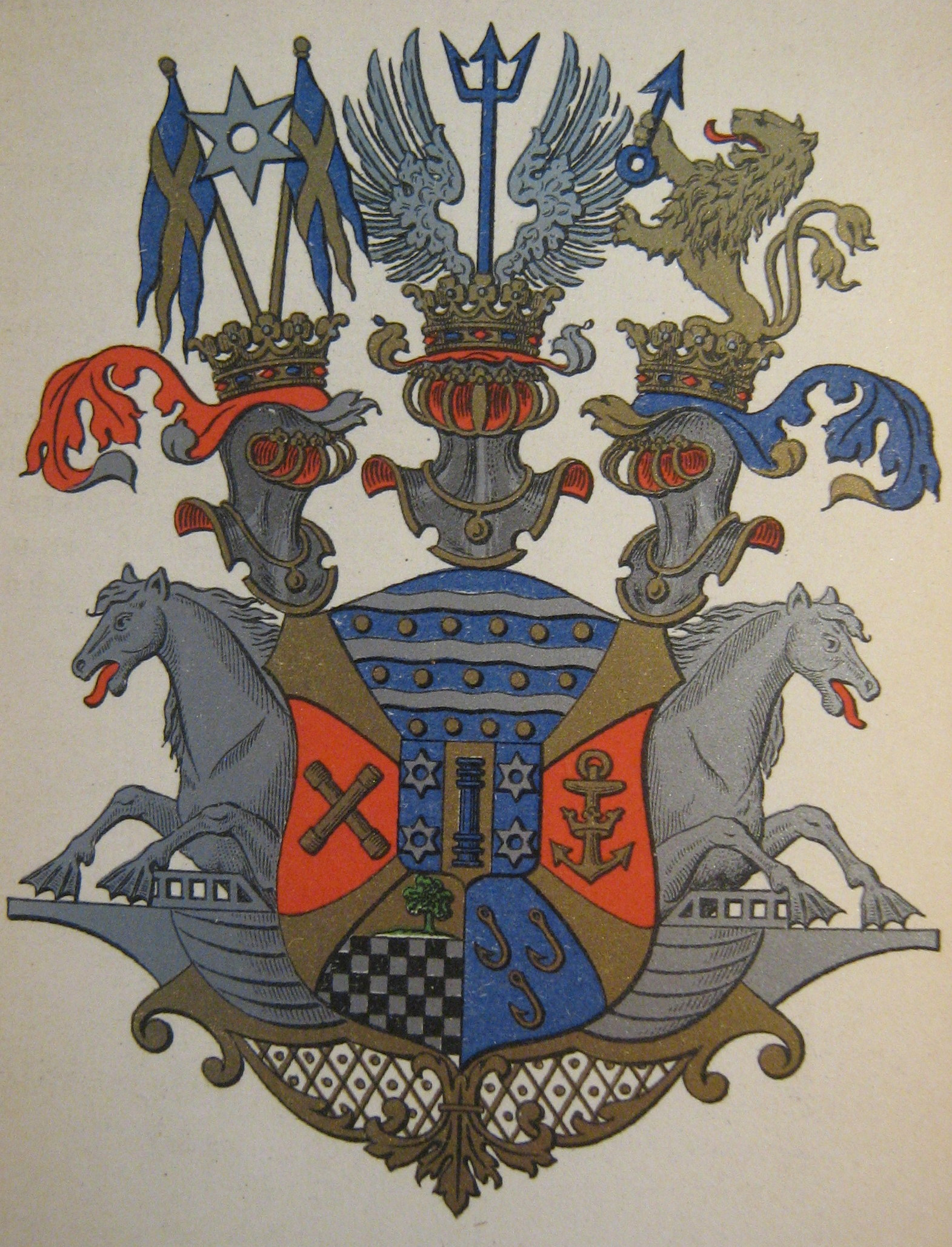 Grevliga ätten ridderstolpes vapen